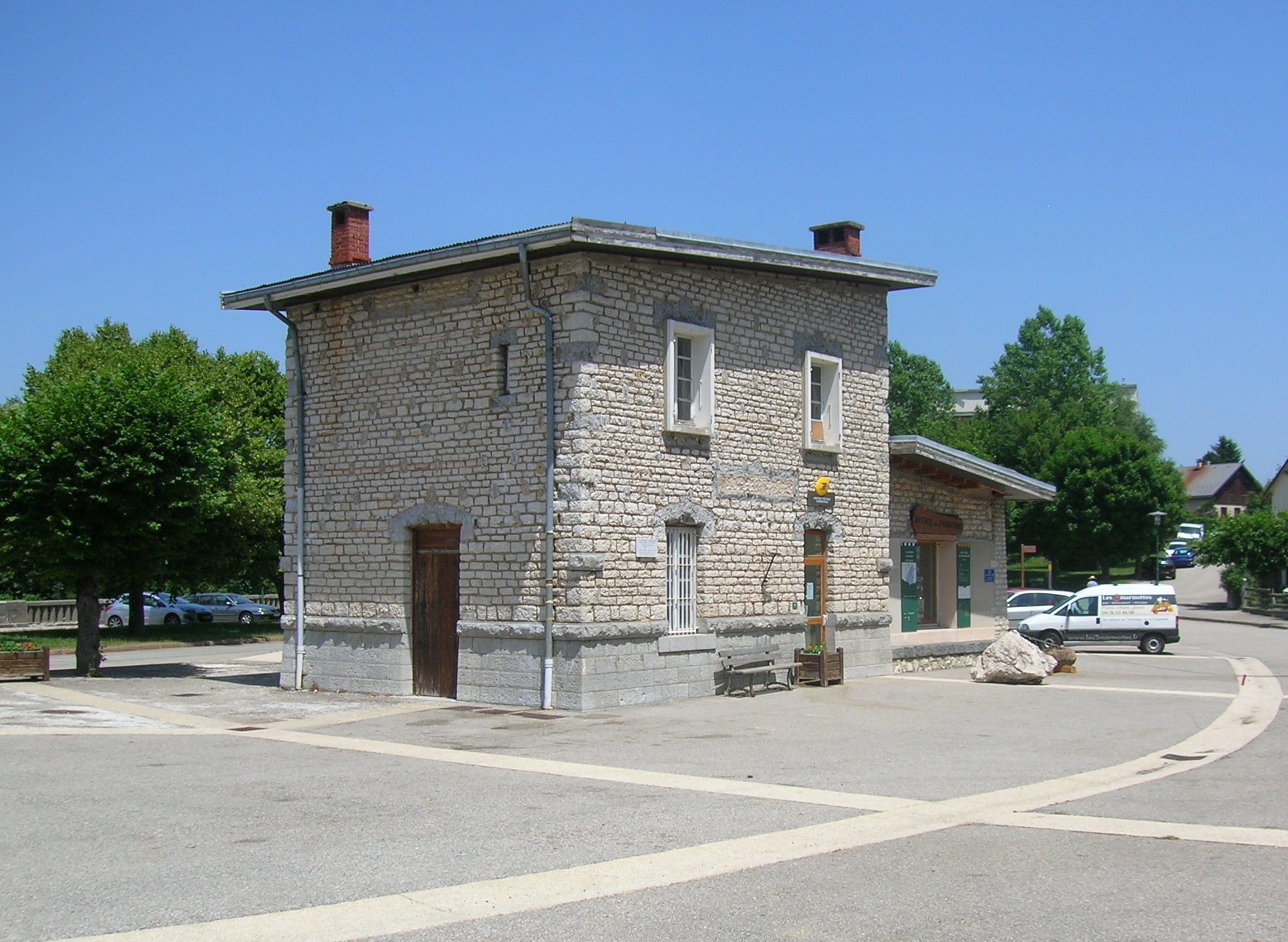 office du tourisme, ancienne gare du tram (ligne Grenoble - Villard-de-Lans). Saint-Nizier-du-Moucherotte, Isère, France.